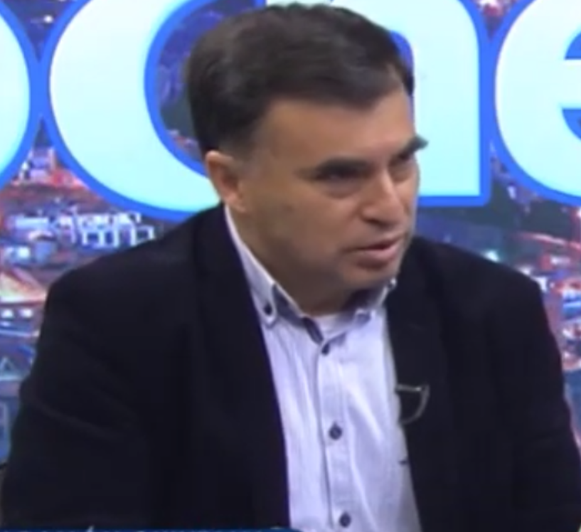 Ministro Juan Ramon Quintana en 2019